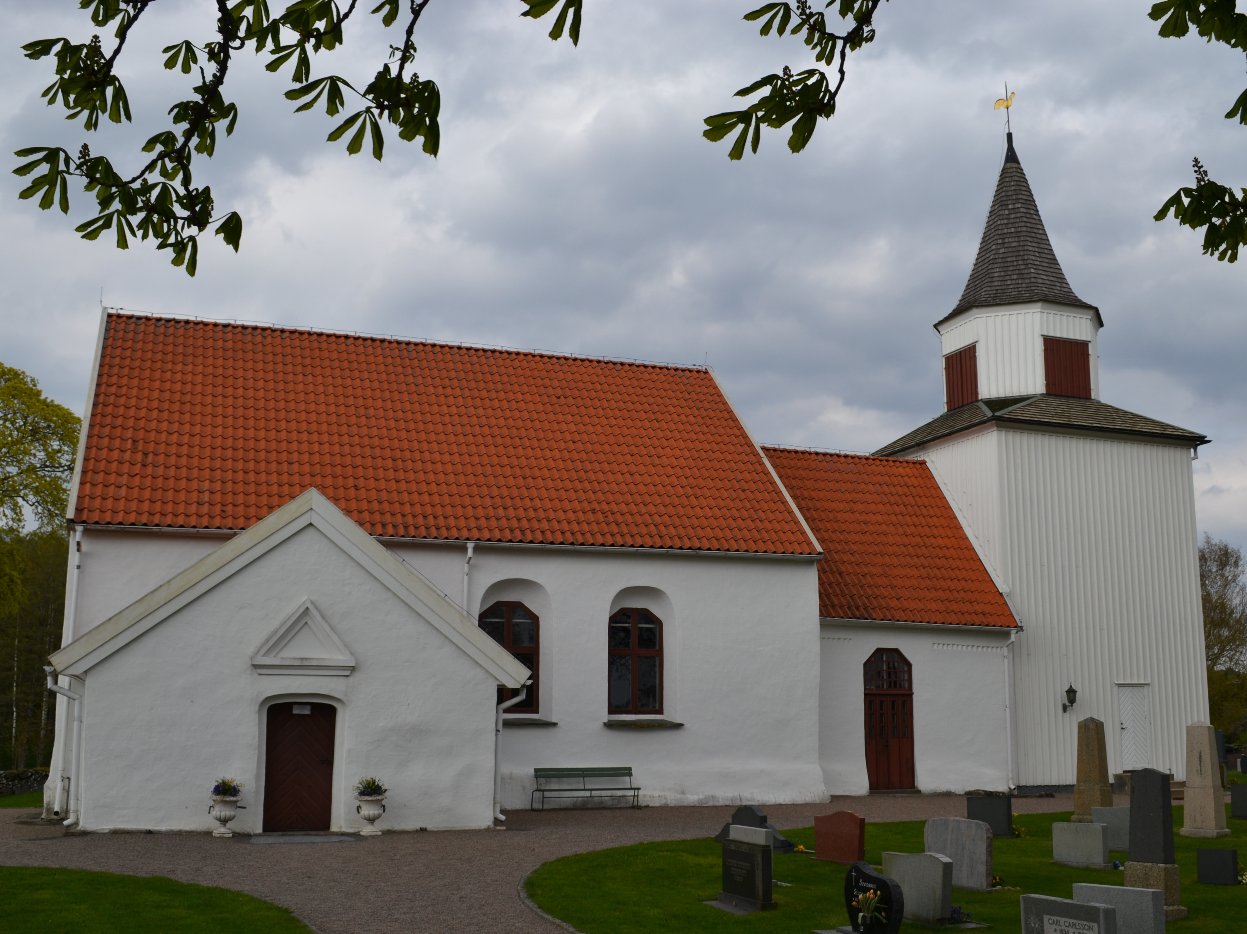 Torpa kyrka, Varbergs kommun.